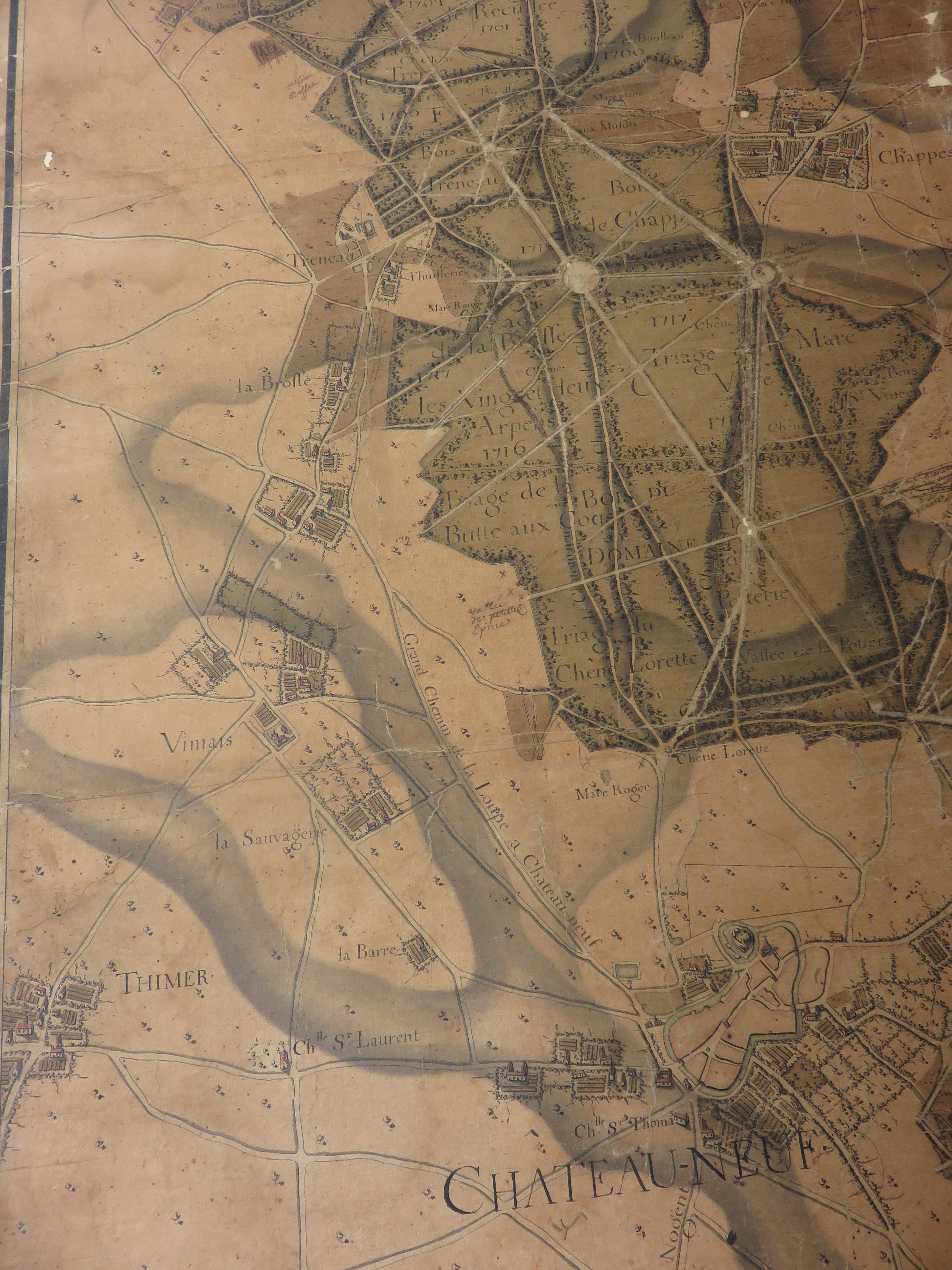 Détail de la carte générale des forêts et bois dans l'étendue de la maîtrise de Châteauneuf en Thymerais, centrée sur Châteauneuf et Tresneau ( situation entre 1723 et 1748)